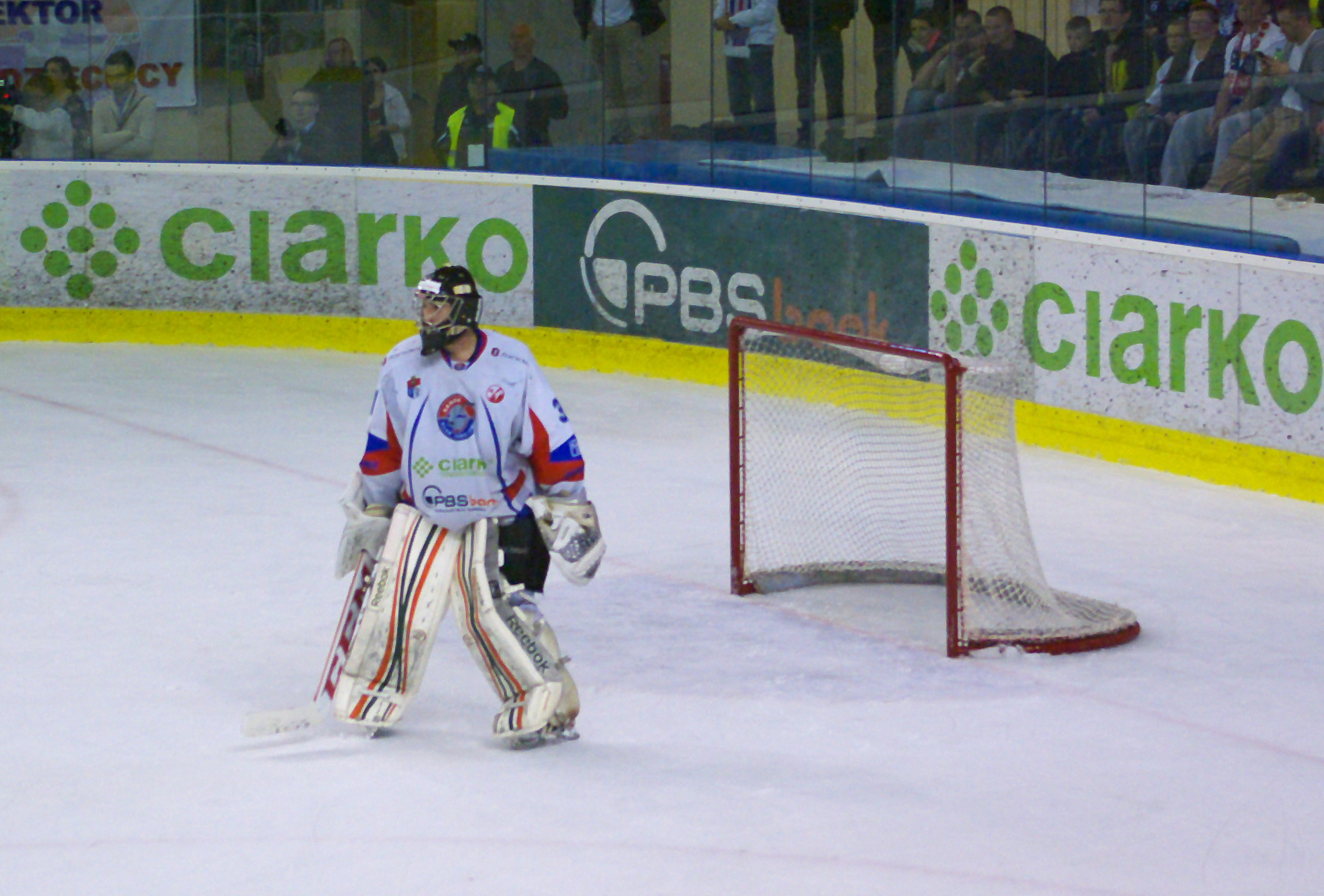 Szósty mecz finałowy o mistrzostwo Polski w hokeju na lodzie w sezonie PHL 2013/2014: Ciarko PBS Bank KH Sanok – GKS Tychy (2:0), 3 kwietnia 2014 w Sanoku (Arena Sanok). John Murray